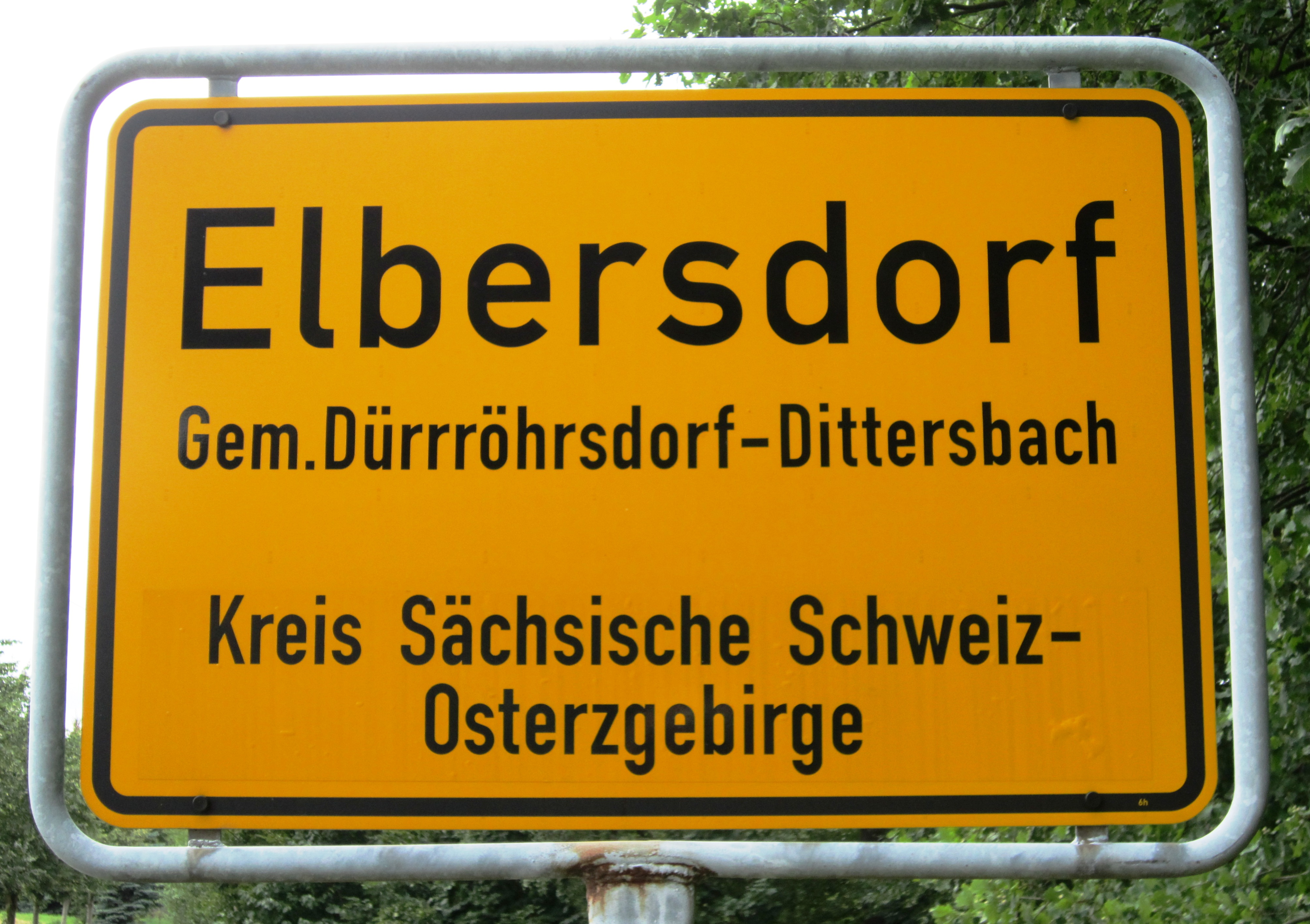 elbersdorf